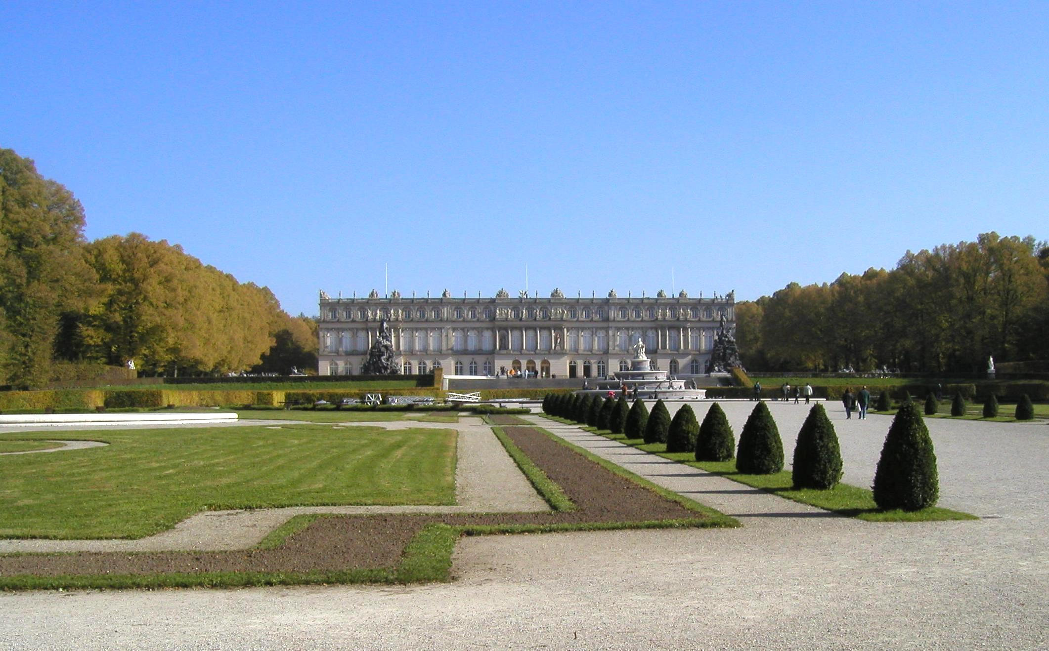 Herrenchiemsee.